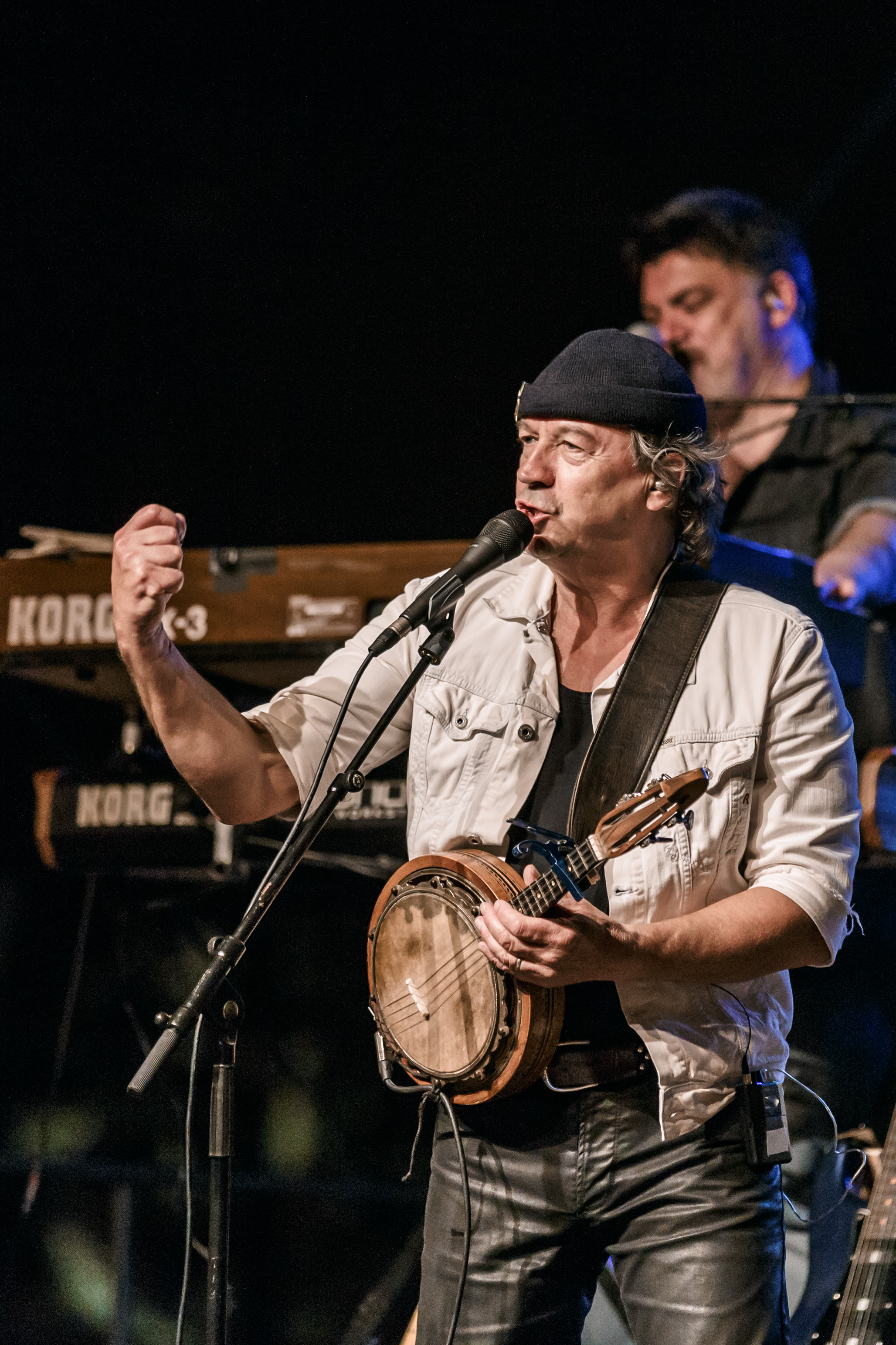 Soldat Louis en concert gratuit place de la Résistance à Quimper en clôture du festival de Cornouaille le dimanche 24 juillet 2016.